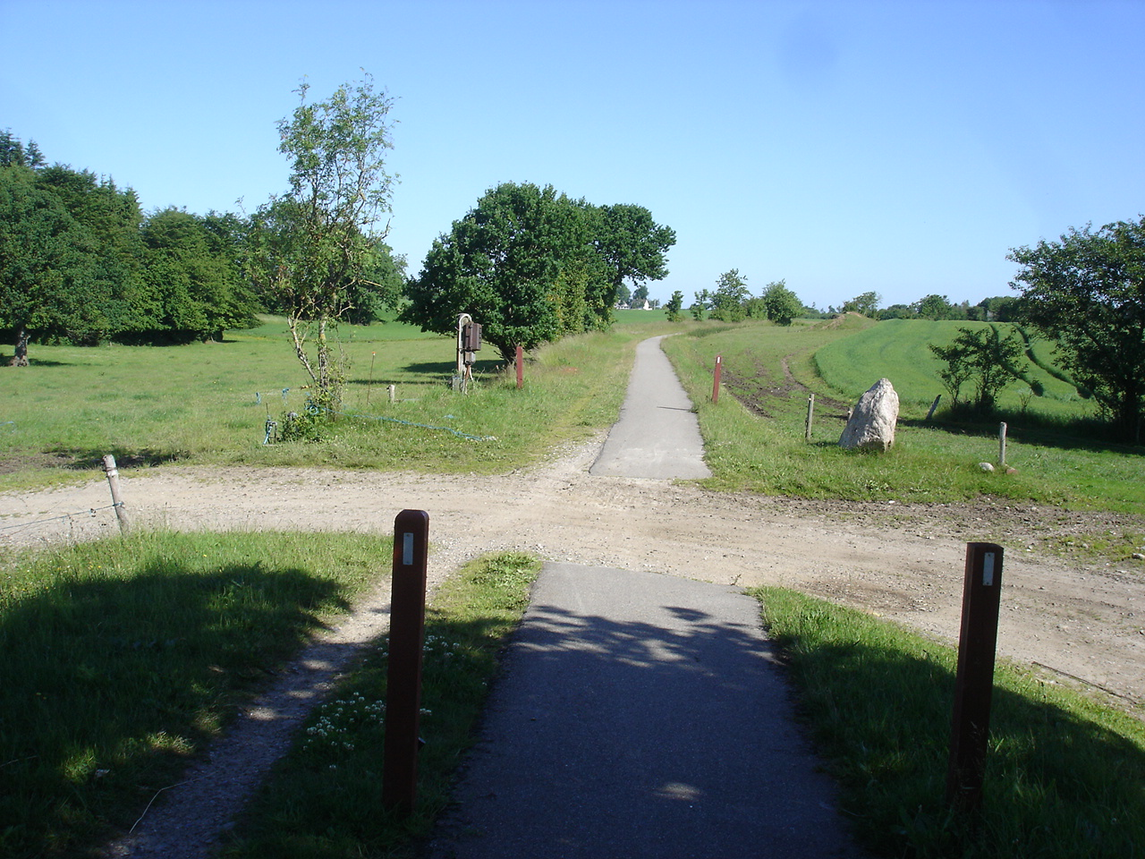 Bryrupbanestien krydser Rodvigsballevej - Rodvigsballe trinbræt lå 200 m fremme ved en nu nedlagt markvej